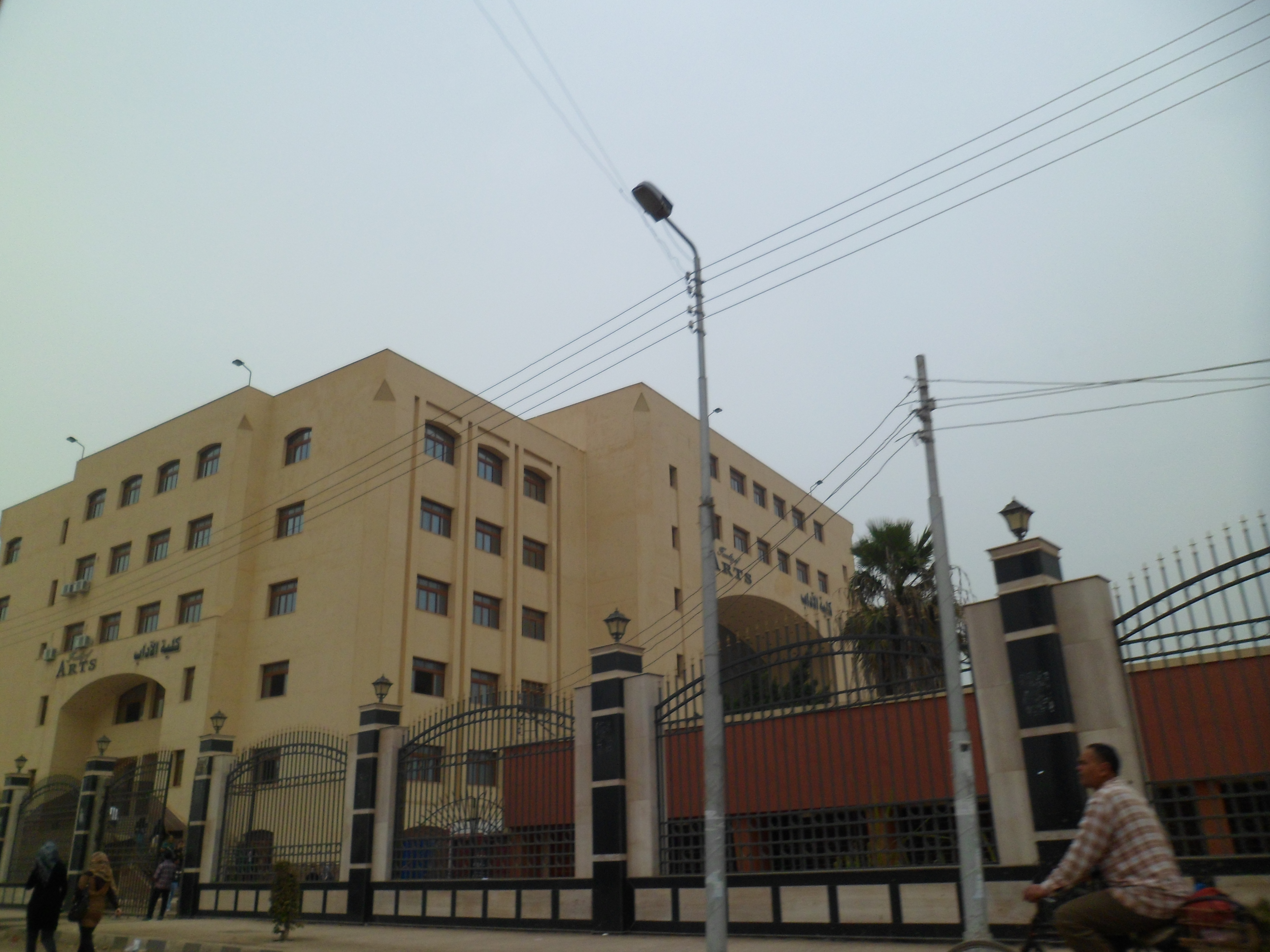 كلية الآداب، جامعة كفر الشيخ، مدينة كفر الشيخ، مصر.